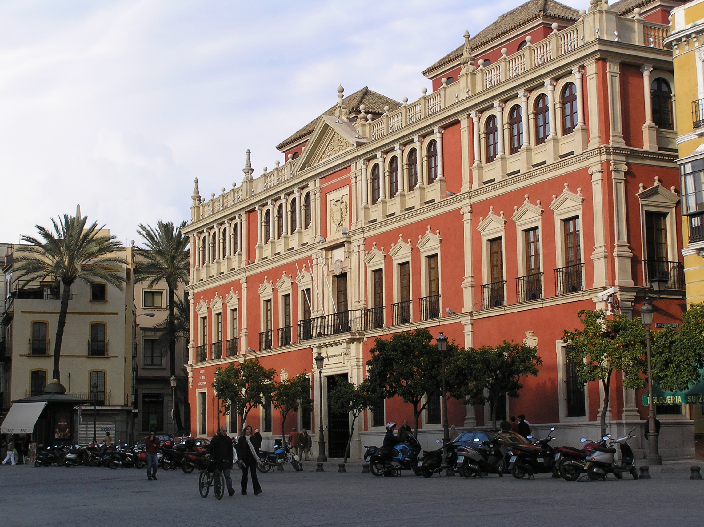 Antigua Audiencia de Sevilla Antigua Audiencia Provincial. Actualmente es propiedad de la Caja de Ahorros San Fernando de Sevilla.